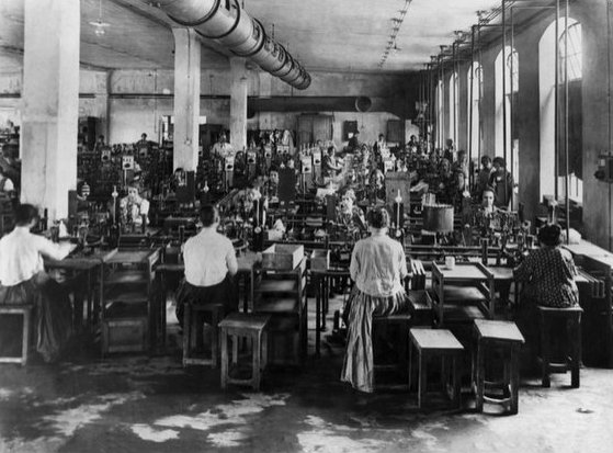 Az Egyesült Izzó, ahol 1909-ben jegyezték be a Tungsram védjegyet a 121400 lajstromszámon.